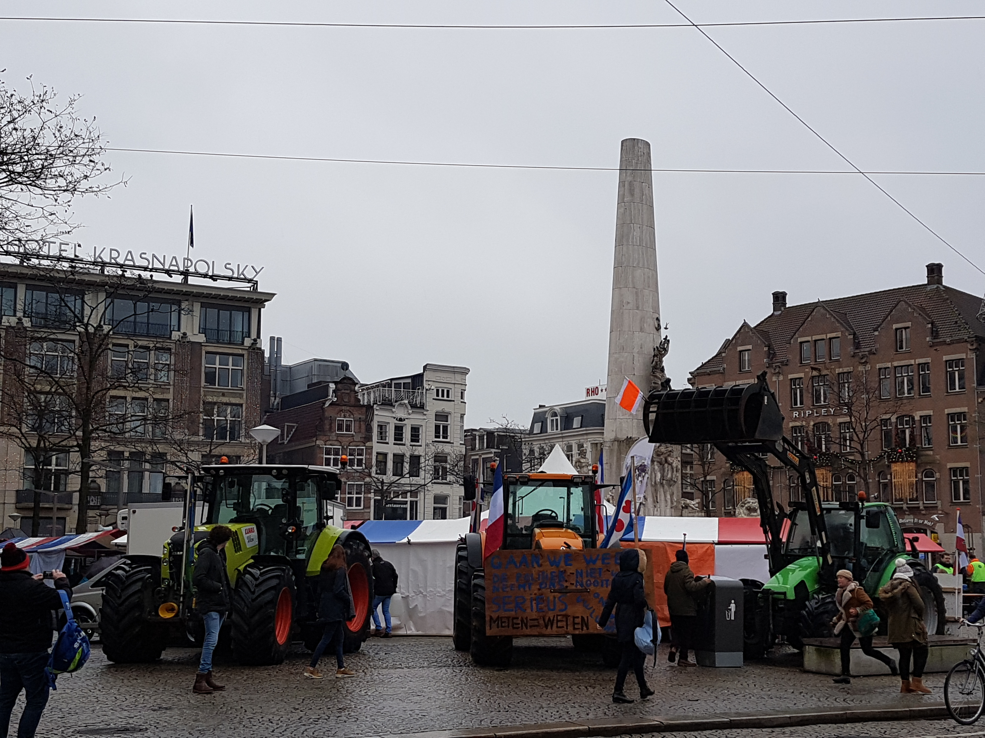 Een deel van het boerenprotest op de Dam in Amsterdam op 13 december 2019